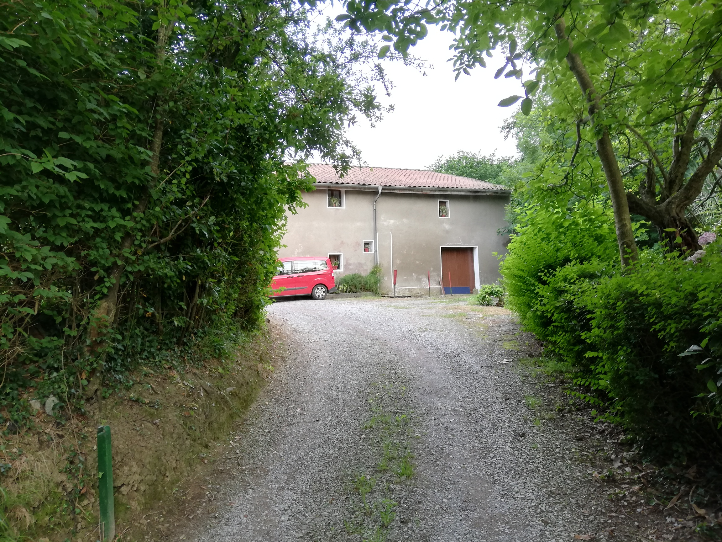 XVI. mendeko baserria da. Inguruko zaharrena.